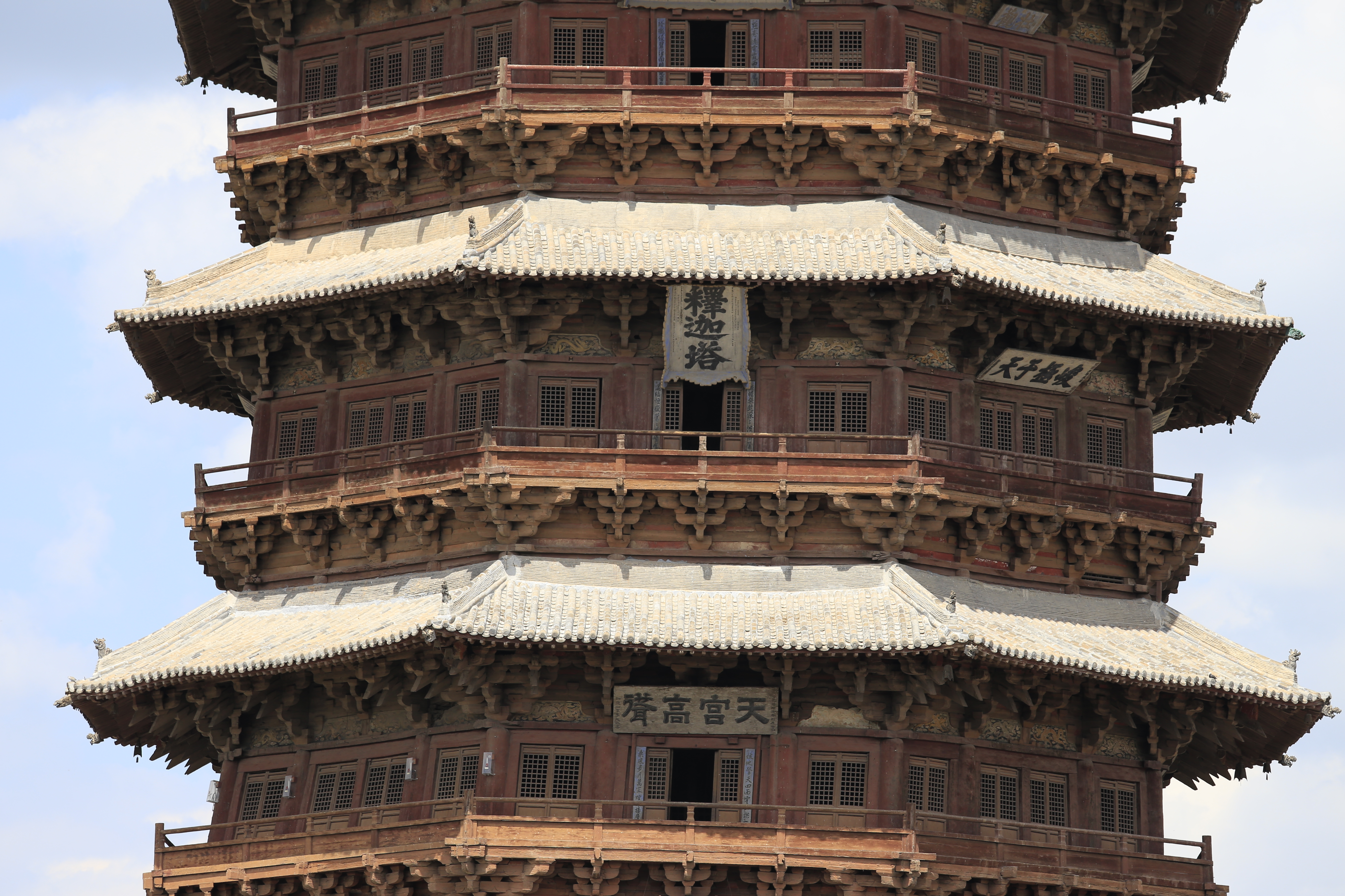 应县佛宫寺释迦塔